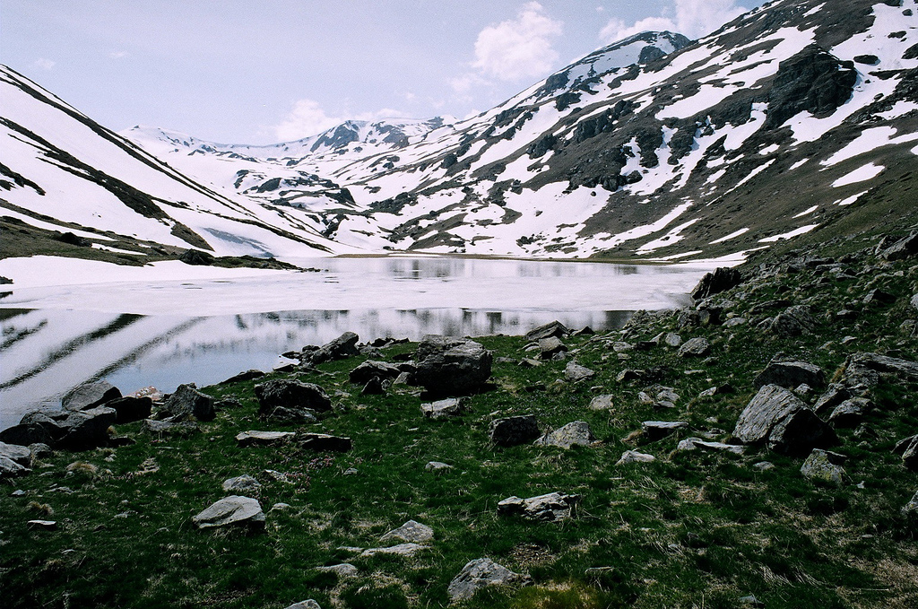 Боговињско езеро на Шар Планина